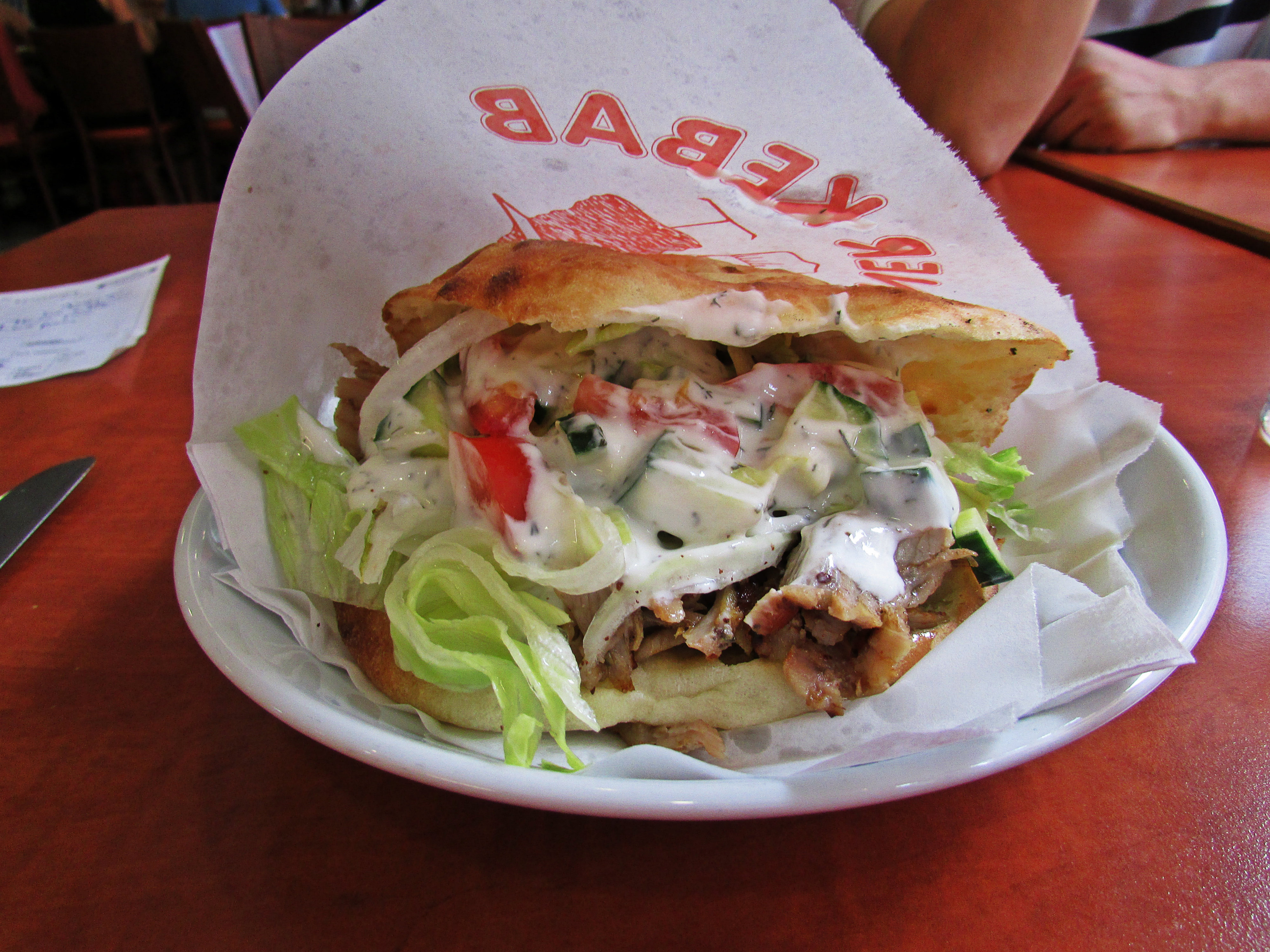 Doener Kebab Döner kebab